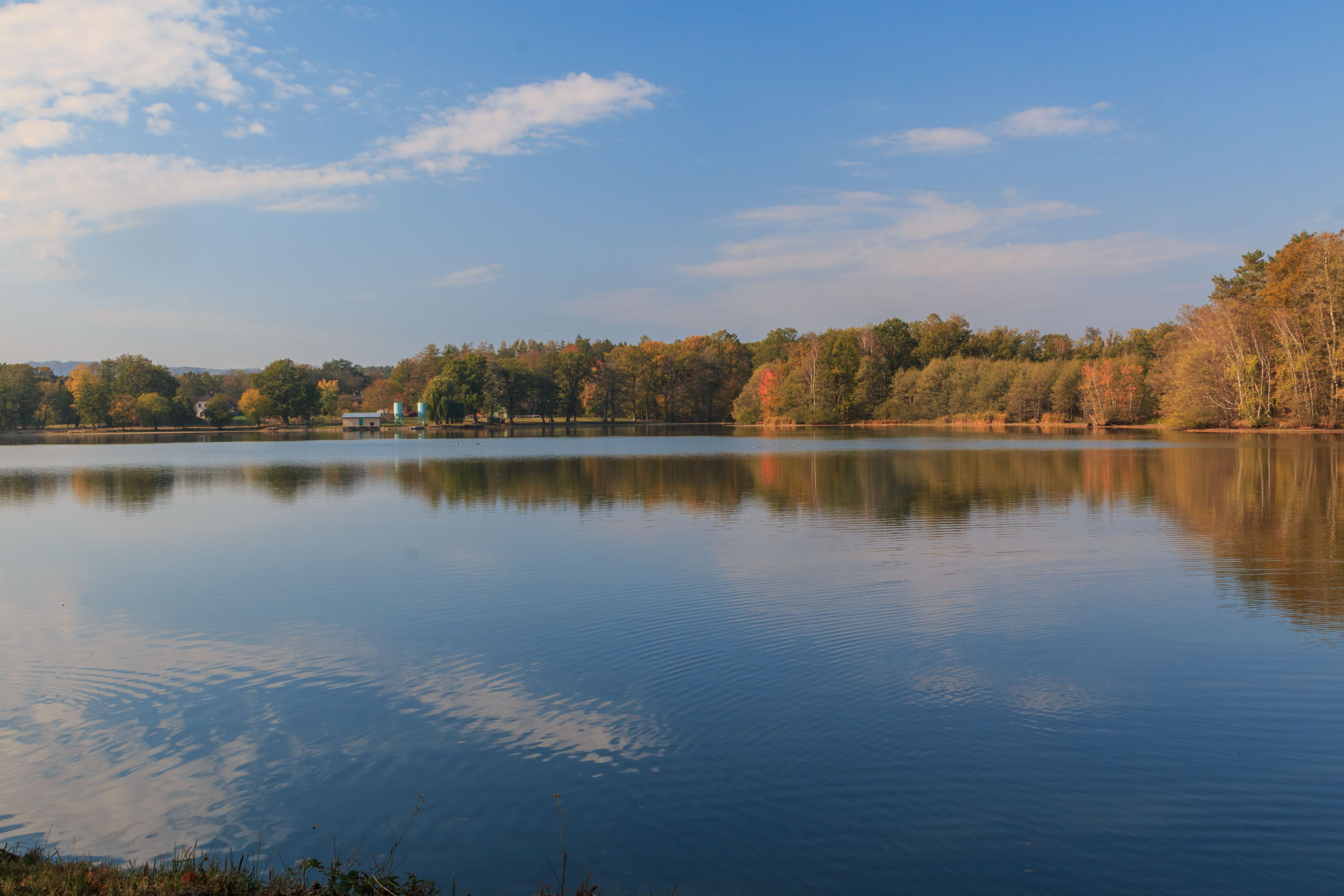 Pařezný rybník u Libáně Project: Vodstvo. Ticket: 1618.